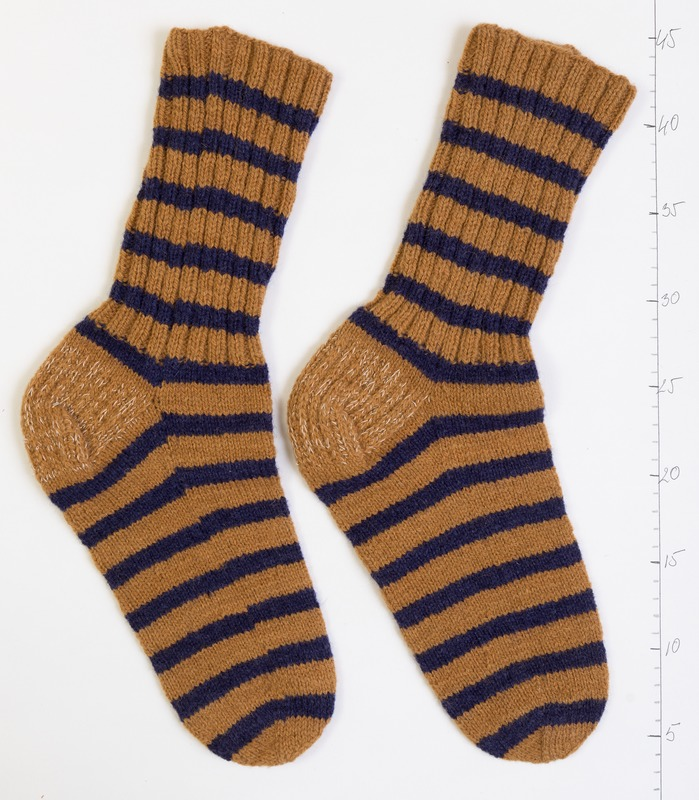 Varrastel kootud sokid on silmuskoes sibulakoorepruuni ja sinise triibulised, villasest lõngast. Säär soonikkoes, kand topeltkoes ja tugevdusniidiga.